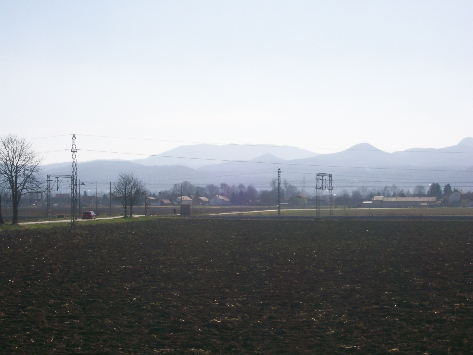 Drenje Brdovečko, općina Brdovec, Zagrebačka županija